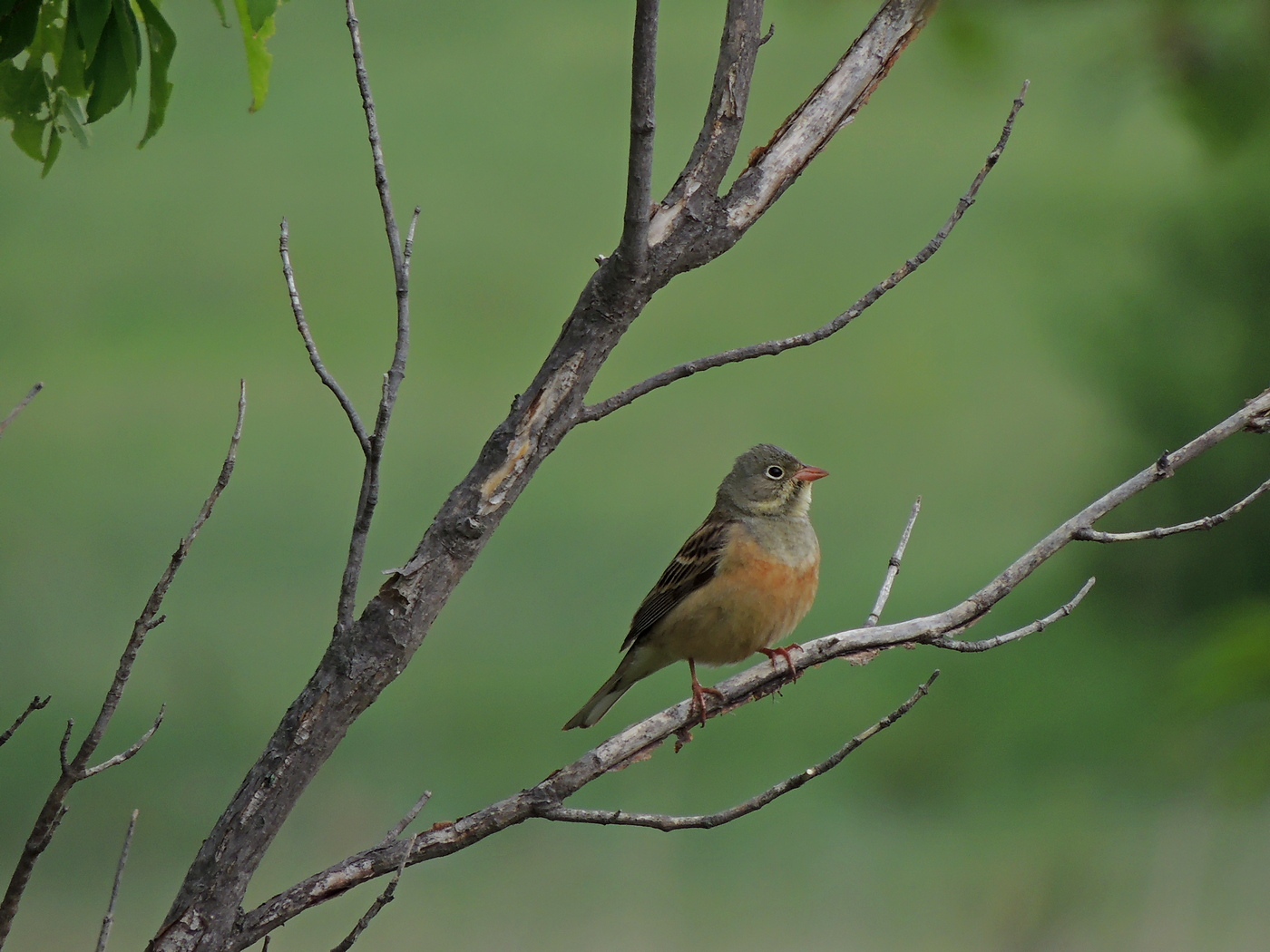 Srpski naziv vinogradska strnadica Opis vrste D.t. 15-16,5 cm. Gnezdi se u većem delu južne i istočne Evrope, manjem delu centralne Evrope, u Maloj Aziji, na Kavkazu i u delu centralne Azije. Selica je. Zimu provodi u podsaharskoj Africi. Naseljava mozaična staništa u kojima se nalaze livade, stepe i pašnjaci sa živicama, šumarcima ili pojedinačnim drvećem i žbunjem, kao i mozaična poljoprivredna područja u ravnicama, pobrđu i na nižim planinama. Gnezda gradi blizu tla, sakrivena u žbunastoj vegetaciji. Hrani se semnjem biljaka, insektima i drugim beskičmenjacima. Populacija u Evropi naglo opada zbog nestanka staništa usled intenziviranja poljoprivrede. U Srbiji je redovna gnezdarica pobrđa u većem delu zemlje, čija se populacija procenjuje 6.000-8.000 gnezdećih parova (Puzović et al 2009). Status zaštite vrste IUCN crvena lista - Kategorija LC; Direktiva o pticama EU - Annex I; Ptice od posebnog značaja za zaštitu u Evropi: SPEC 2; Konvencija o očuvanju evropske divlje flore i faune i prirodnih staništa - Annex III; Pravilnik o proglašenju i zaštiti strogo zaštićenih i zaštićenih divljih vrsta biljaka, životinja i gljiva: Prilog I Strogo zaštićene divlje vrste biljaka, životinja i gljiva